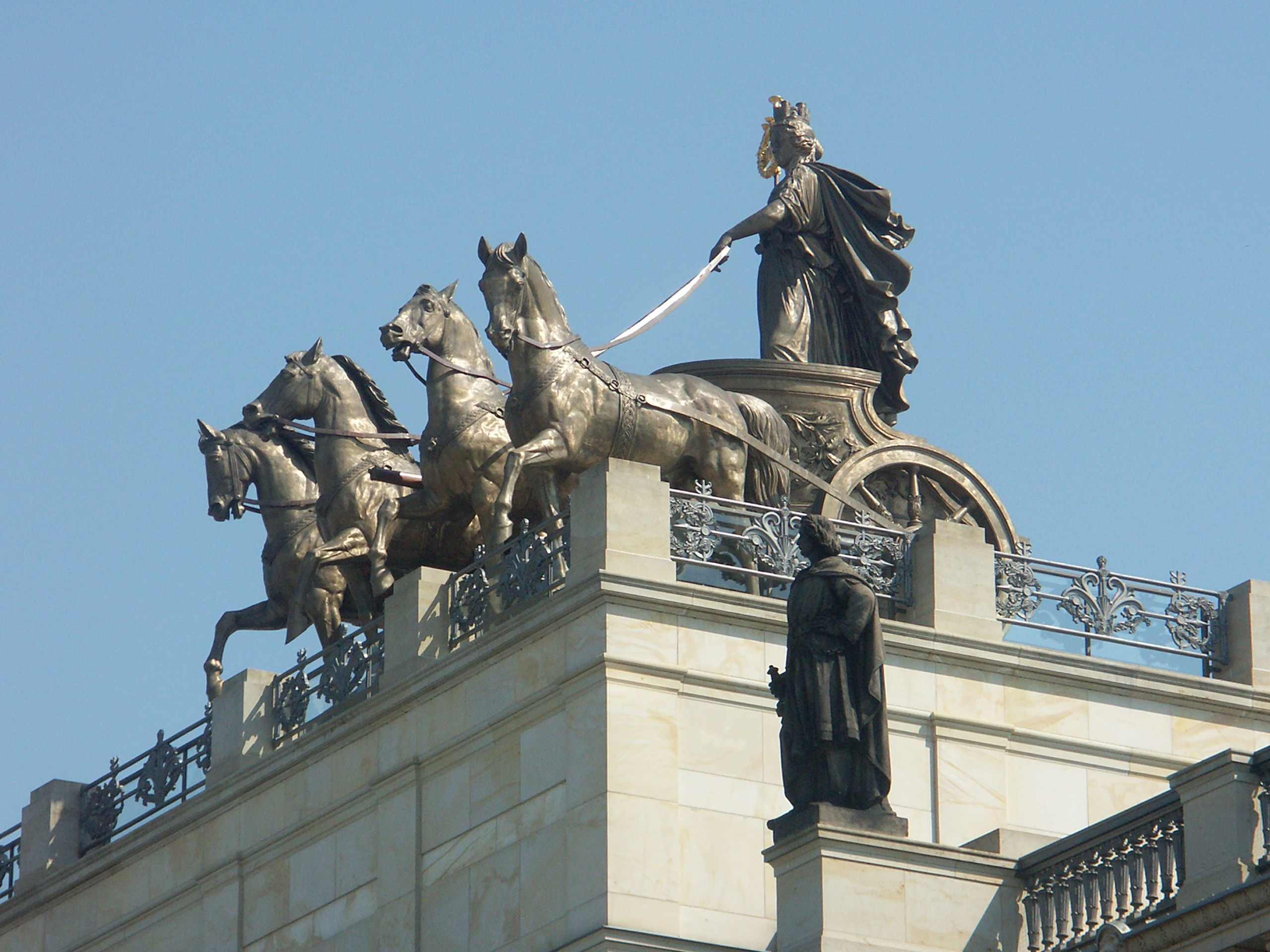 Die neue Quadriga auf dem Braunschweiger Schloss